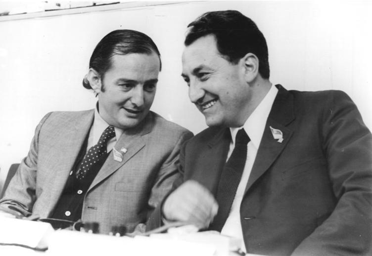 ADN-ZB Kollektiv 17-6-71-ba Berlin: VIII. Parteitag der SED - dritter Beratungstag (17.6.)-Unser Foto zeigt während einer Beratungspause Alejandro Toro Herrera, Mitglied des ZK der Kommunistischen Partei Chiles (r), und Erich Schnake Silva, Mitglied der Politischen Kommission des ZK der Sozialistischen Partei Chiles. (Rep.: Junge) (VIII-C)